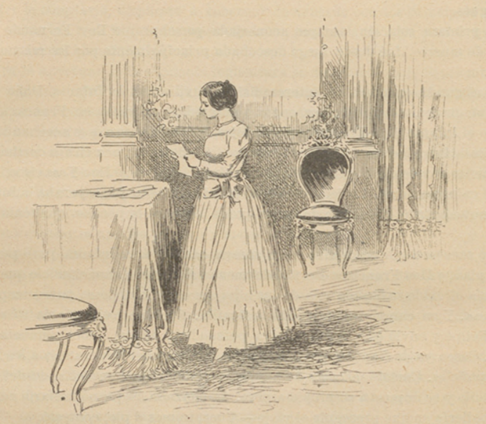 Isabel II leyendo una reveladora carta de su madre